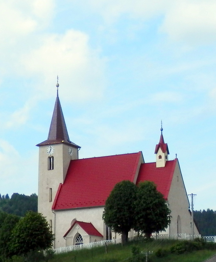 Kostol v obci Vyšný Slavkov, okres Levoča.